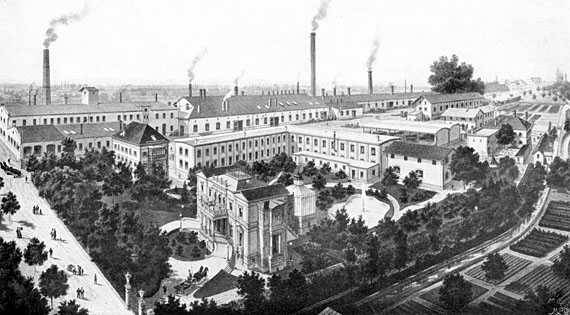 Rauchbild der Machinenbau- und Röhrenfabrik Haag in Augsburg. Im Vordergrund die noch heute erhaltene Villa Haag.